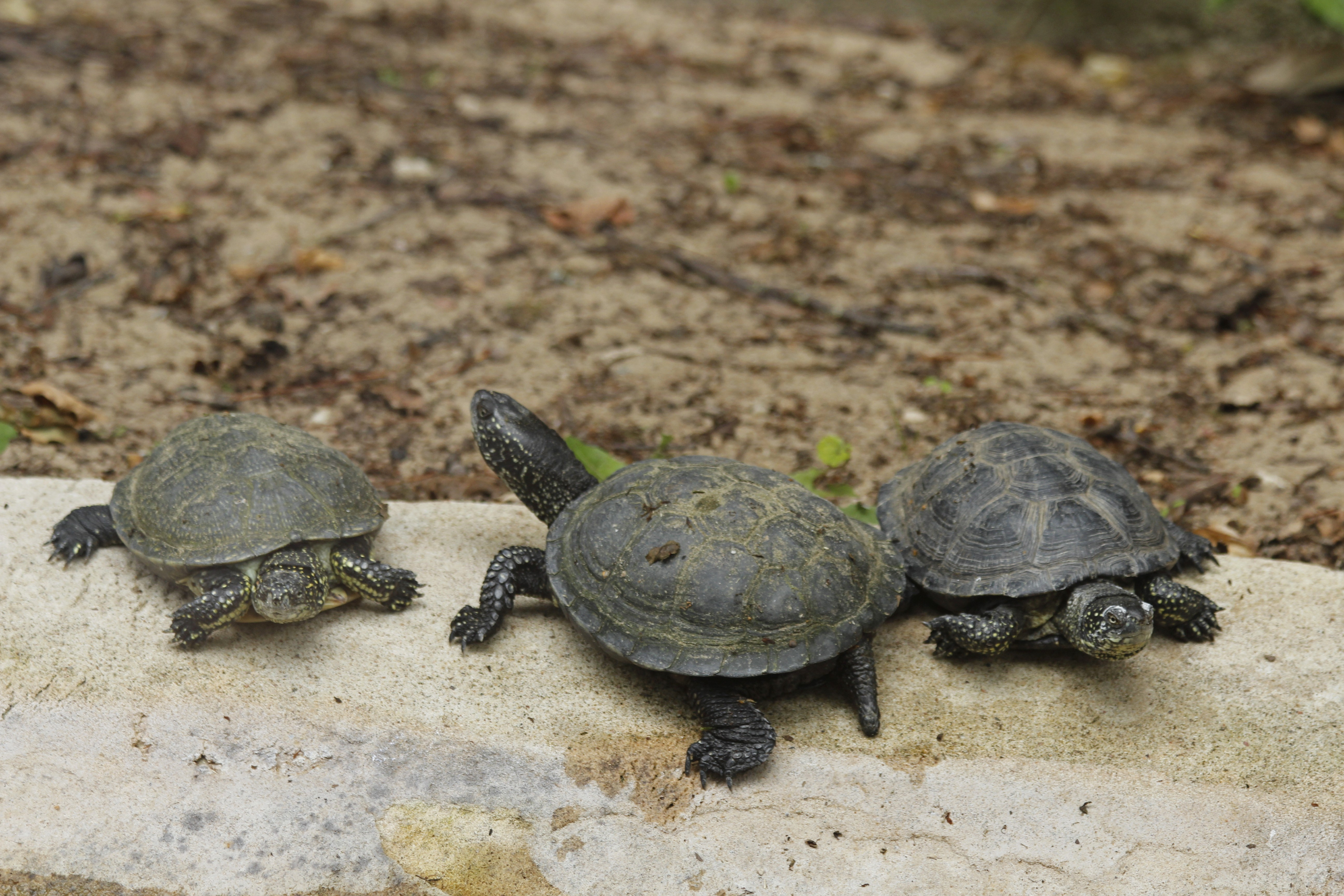 Baliniai vėžliai Lietuvos zoologijos sode